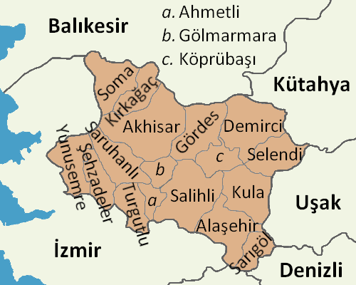 Manisa'nın ilçelerini gösteren harita